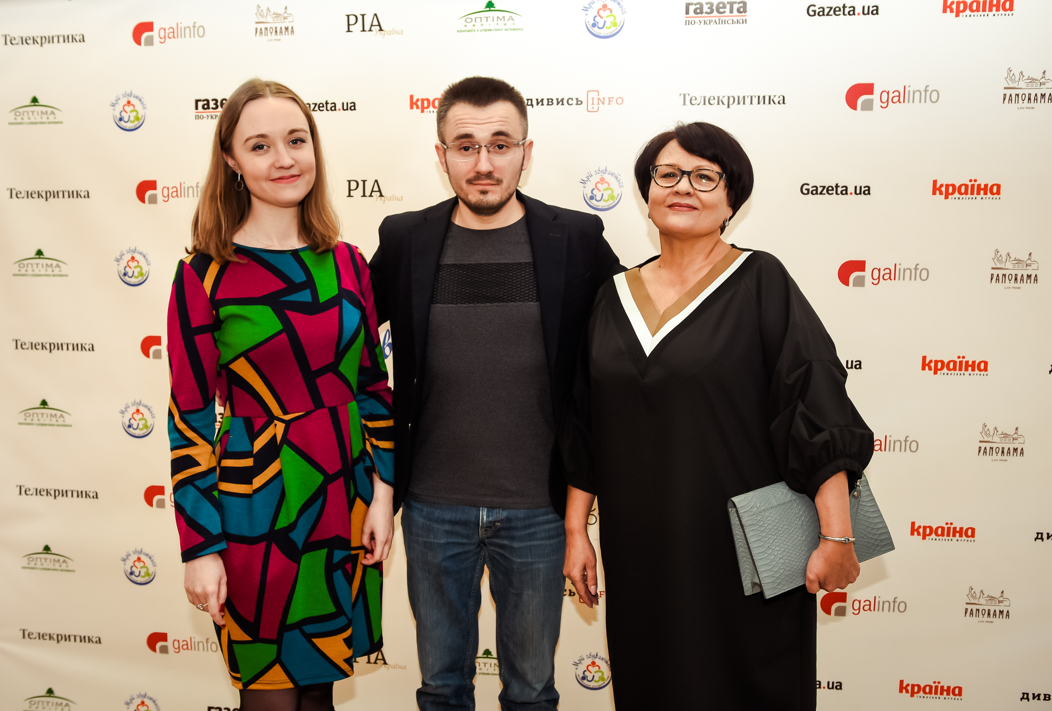 На фото переможці премії "Високі стандарти журналістики-2018": Маргарита Тулуп, Денис Бігус, Ліля Буджурова